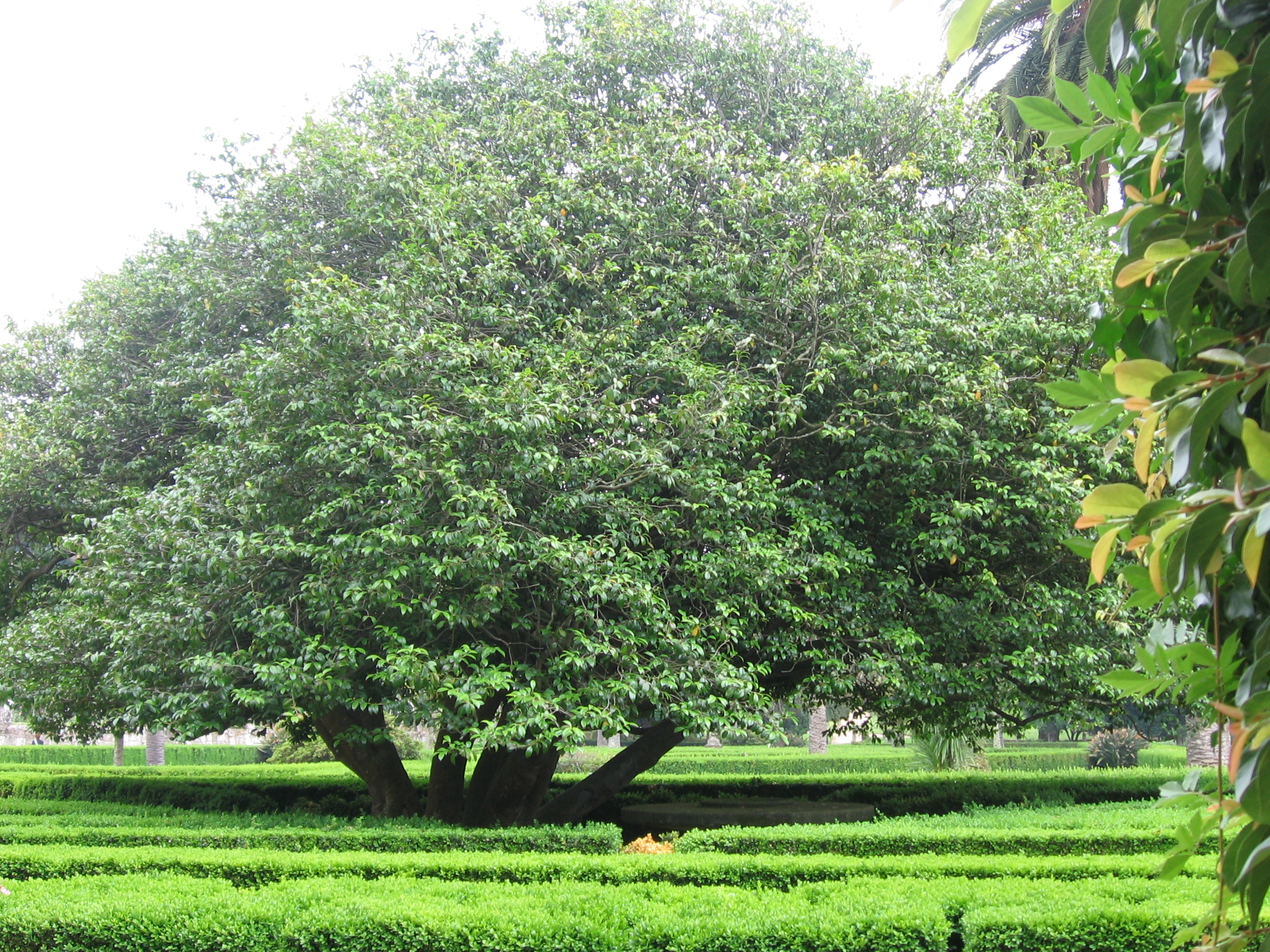 A grande camélia de Castrelos, Vigo